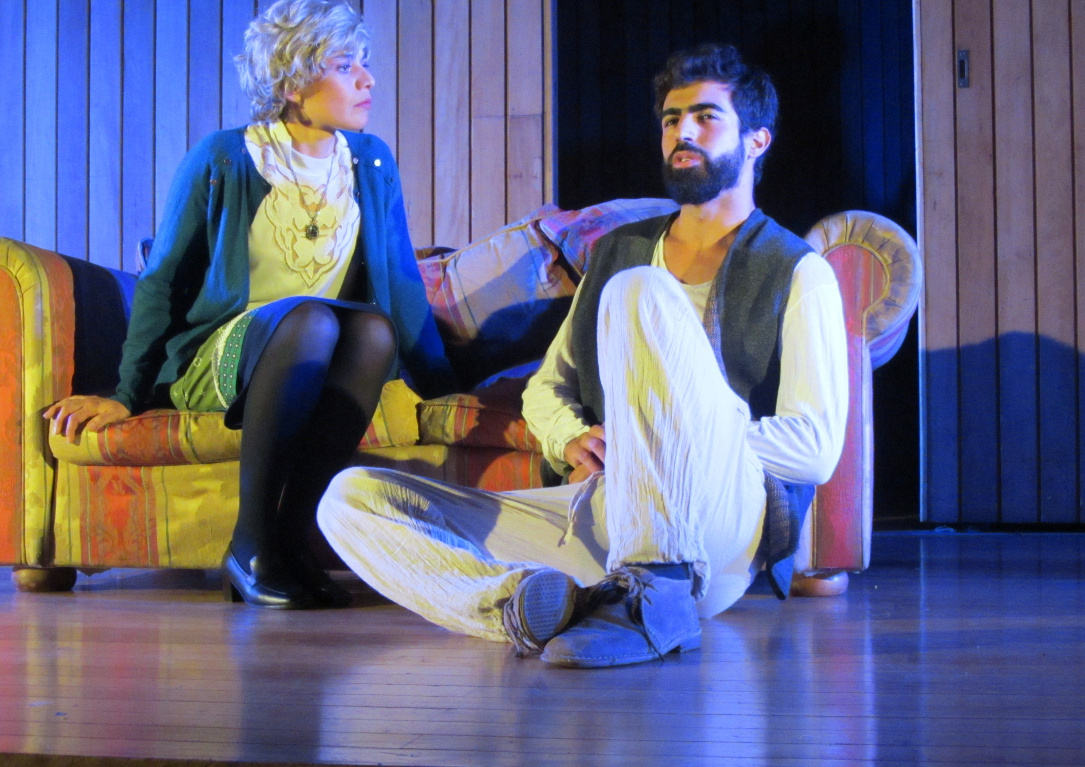 Escena de la obra José, del dramaturgo chileno Egon Wolff, presentada en el auditorio Alfonso Letelier Llona de la Fundación Culural de Providencia el 31 de marzo de 2015. Dirigida por Igor Cantillana; a la derecha, el protagonista José, interpretado por Antonio Zisis